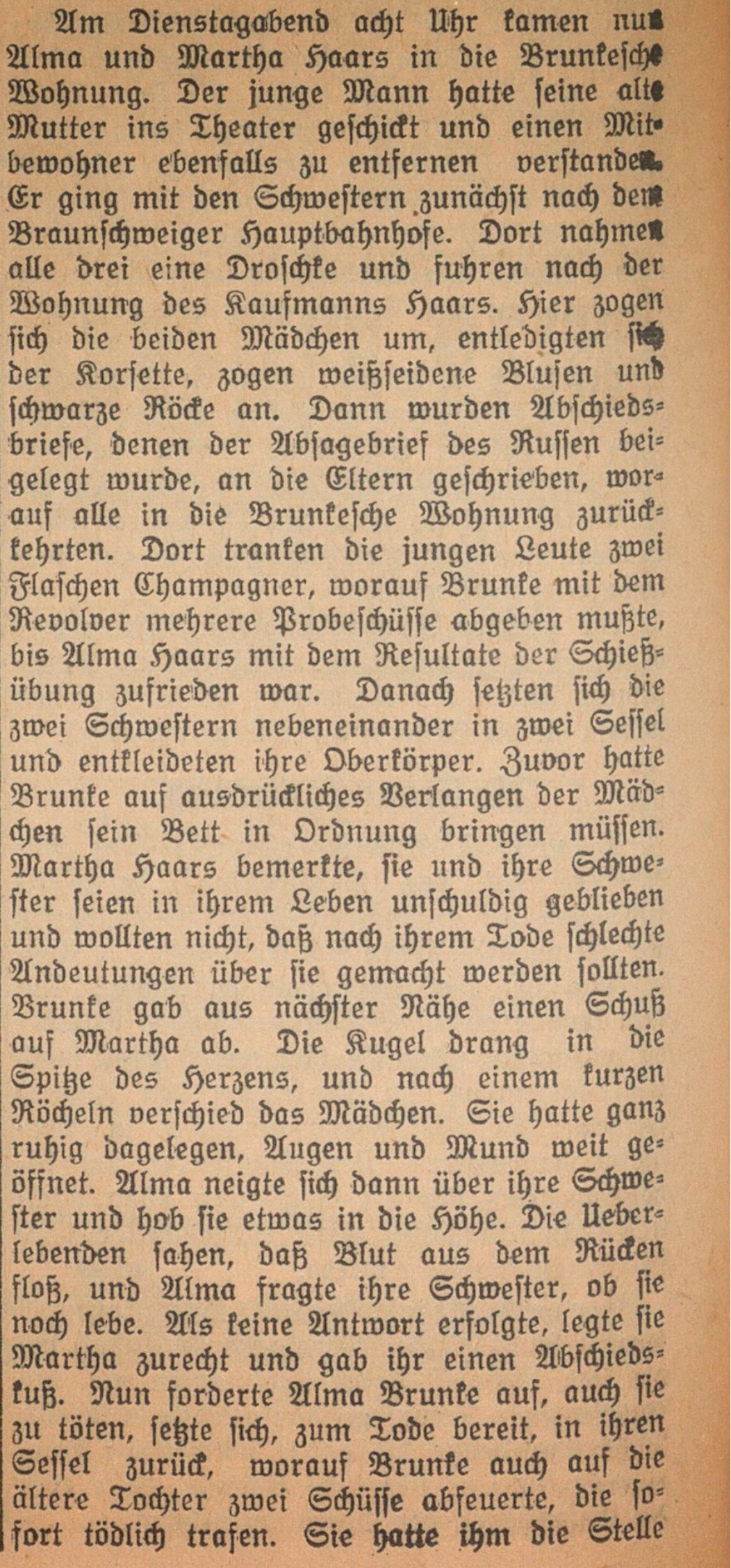 Der Mord des Karl Brunke – Salzburger Wacht 1926. Kleiner Ausschnitt aus dem langen Artikel.